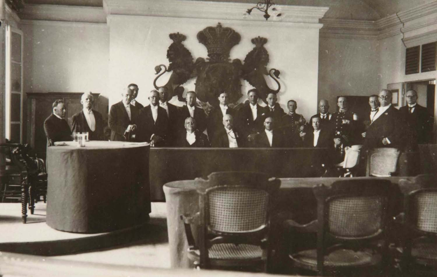 Foto.